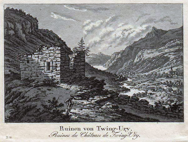 Zwing-Uri